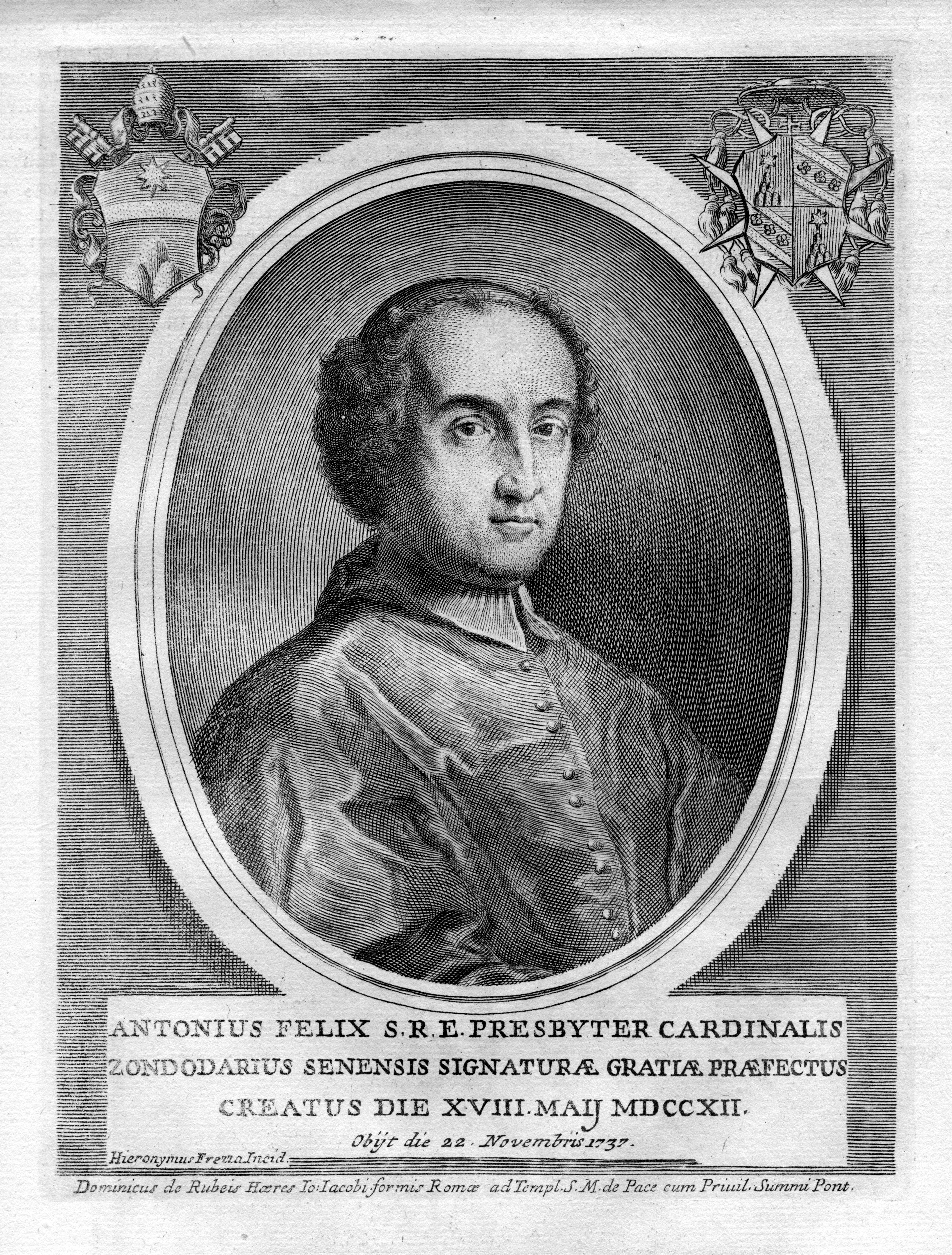 Portrait de Antonfelice Zondadari (1665-1737)